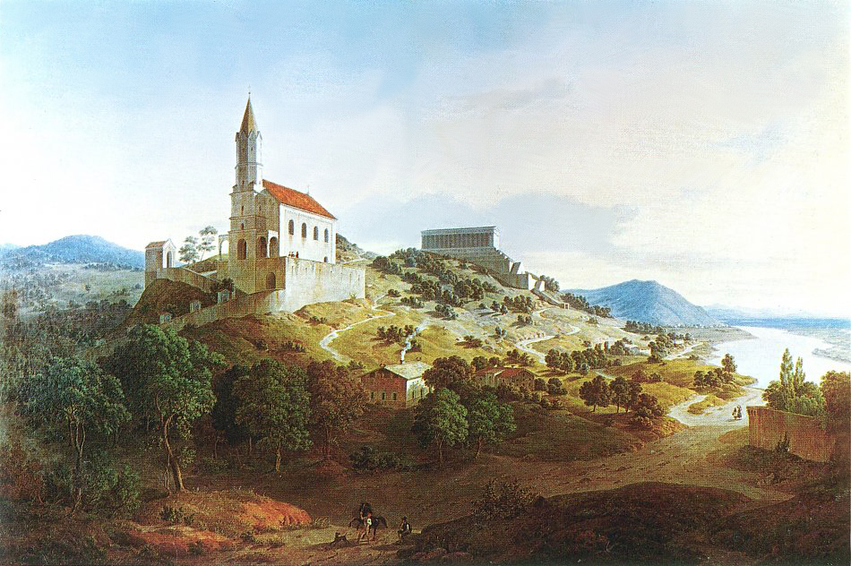 Salvatorkirche und Walhalla zu Donaustauflabel QS:Lde,"Salvatorkirche und Walhalla zu Donaustauf"